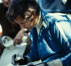 Jean François Piot photo Jacques J. Hoden